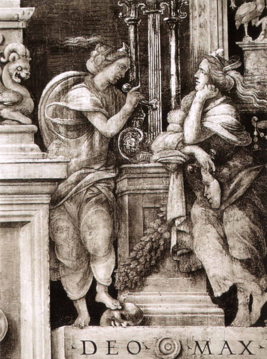 LIPPI, Filippino Fresco Strozzi Chapel, Santa Maria Novella, Florence